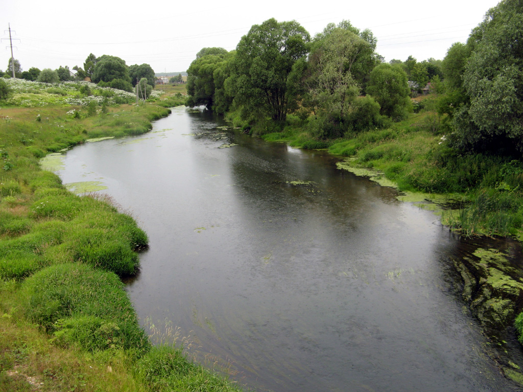 река Лопасня в районе п. Крюково (Чеховский район, Московская область); Lopasnya River near Kryukovo (Moscow Oblast)